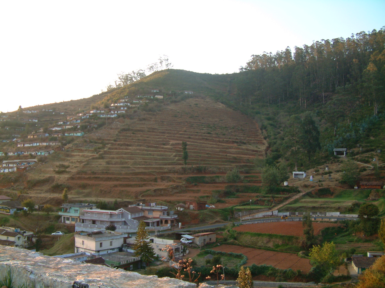 ചള്ളിയാൻ എടുത്തത്